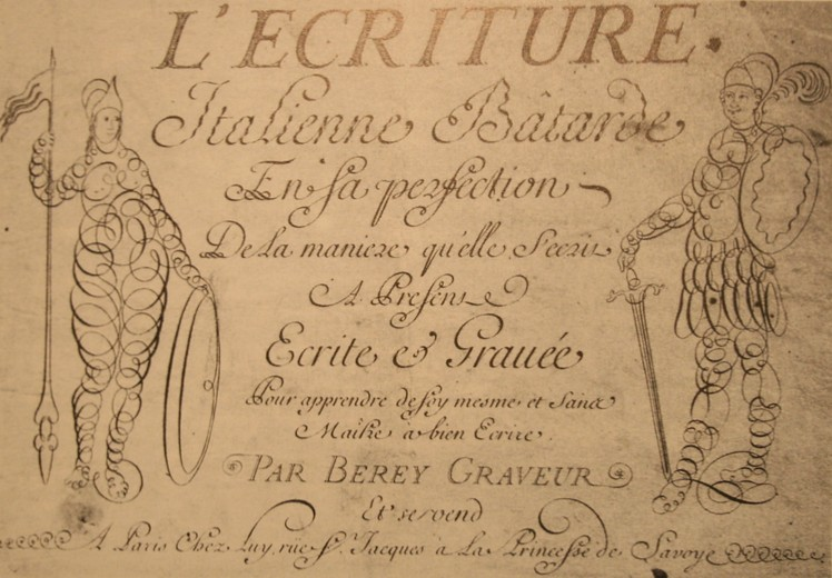 Page de titre d'un traité de C. A. Berey